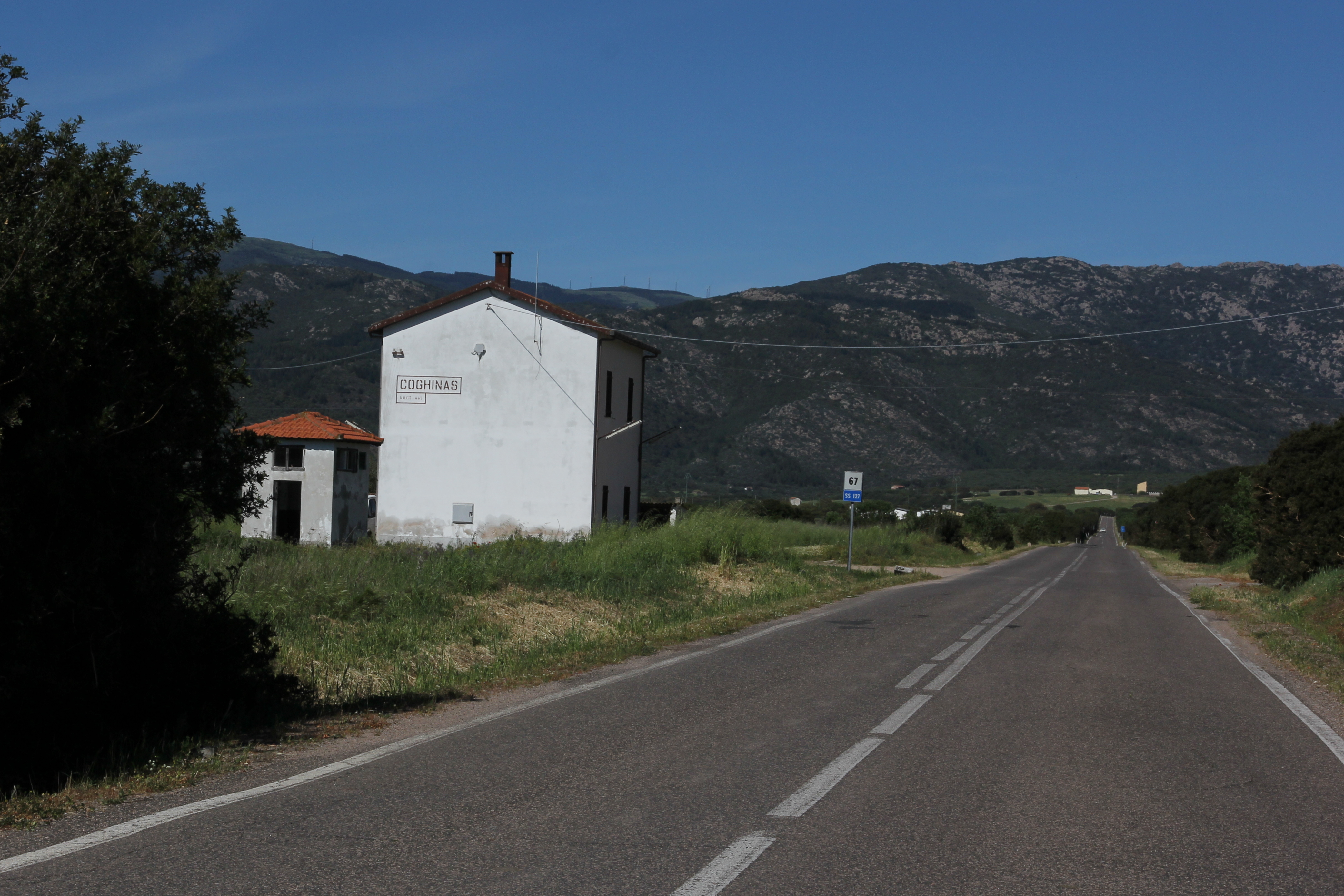 Perfugas, stazione ferroviaria di Coghinas - Ferrovia Sassari-Tempio-Palau